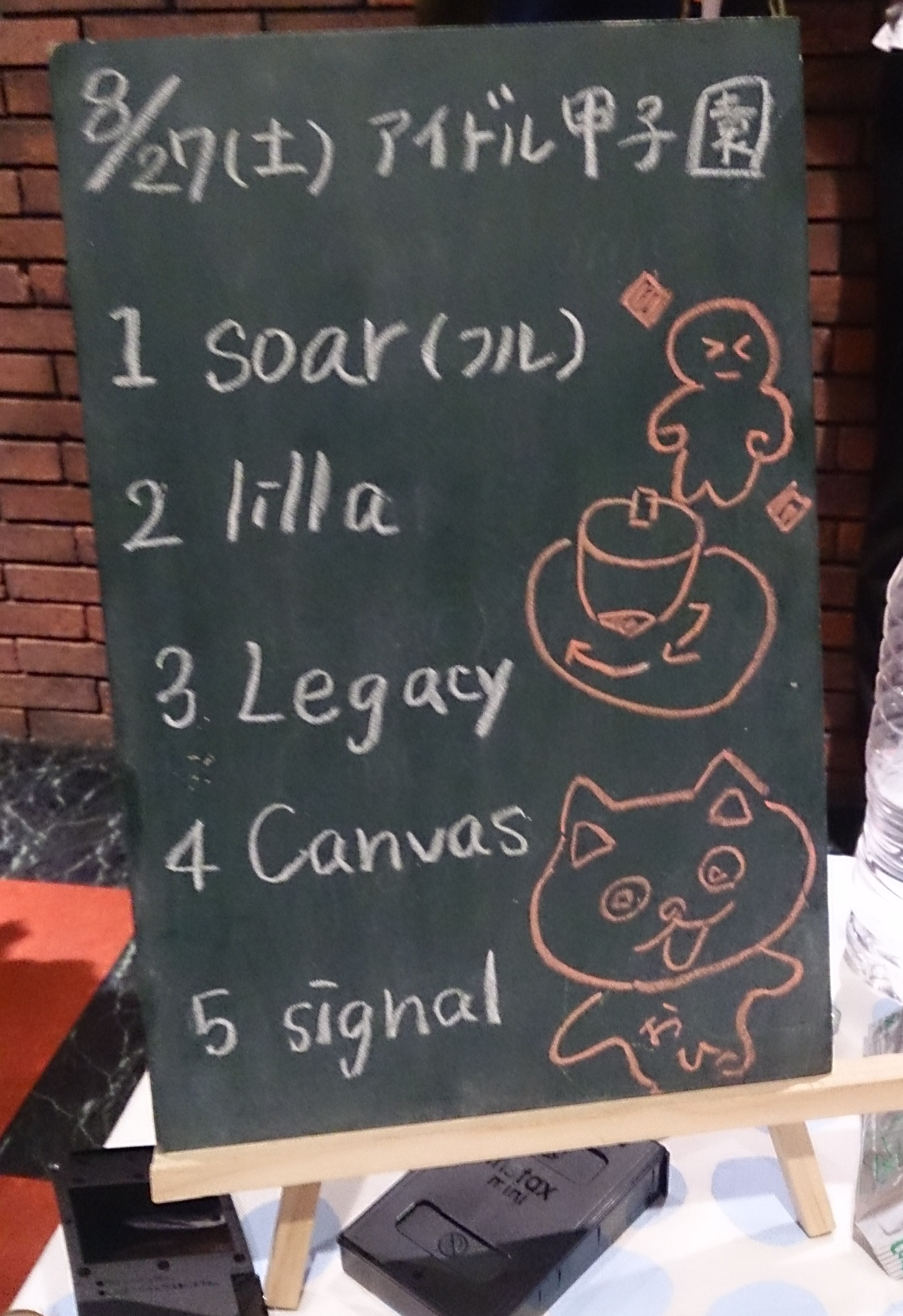 amiinAセトリボード(20160827(1))